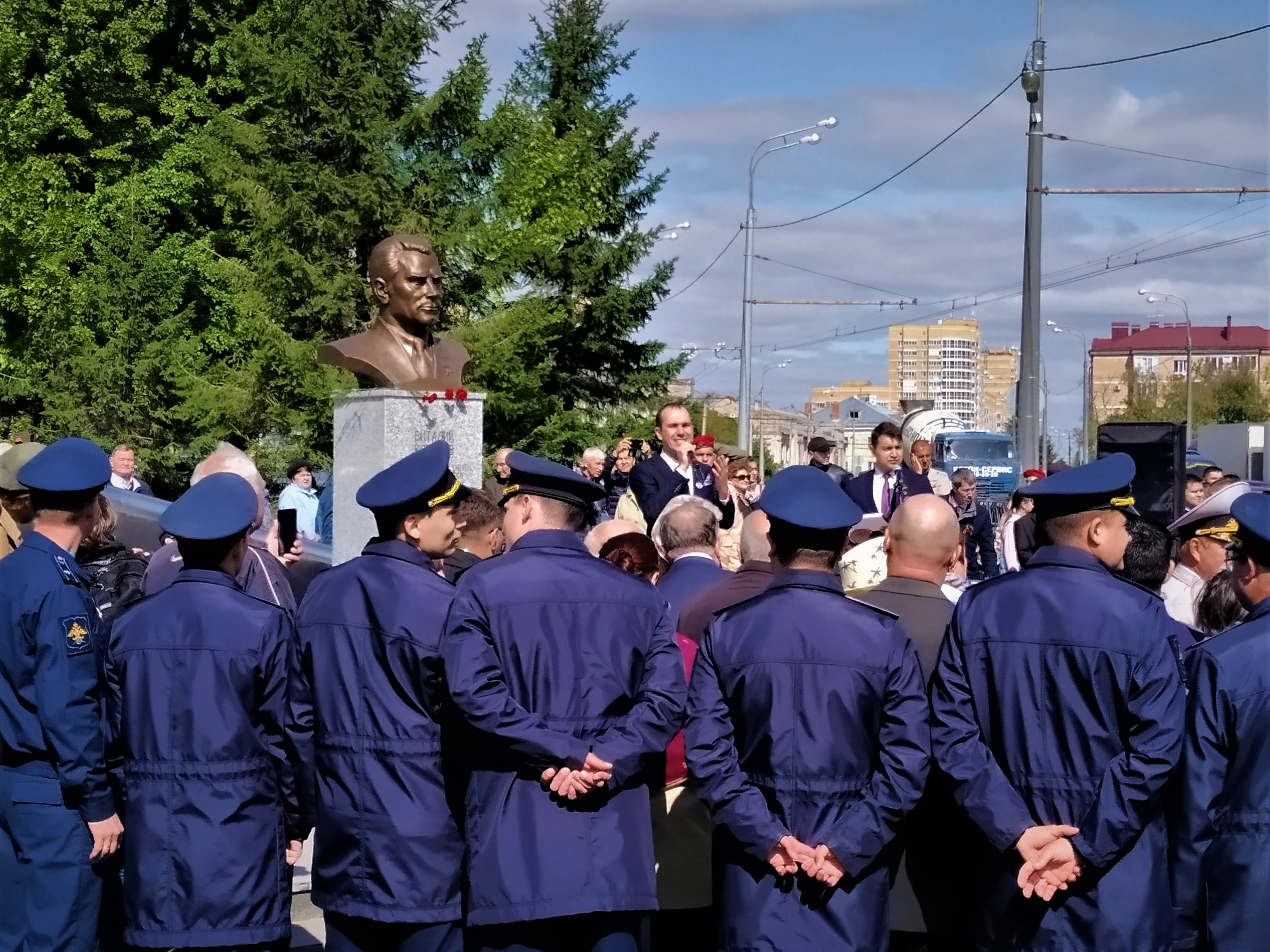 Открытие памятника (бюста) В.Е. Копылову (1926 - 1995) - директору Казанского авиационного производственного объединения им. С.П. Горбунова (1973 — 1994 гг.) (пересечение улиц Копылова, Побежимова и Ленинградской в Авиастроительном районе города Казани).